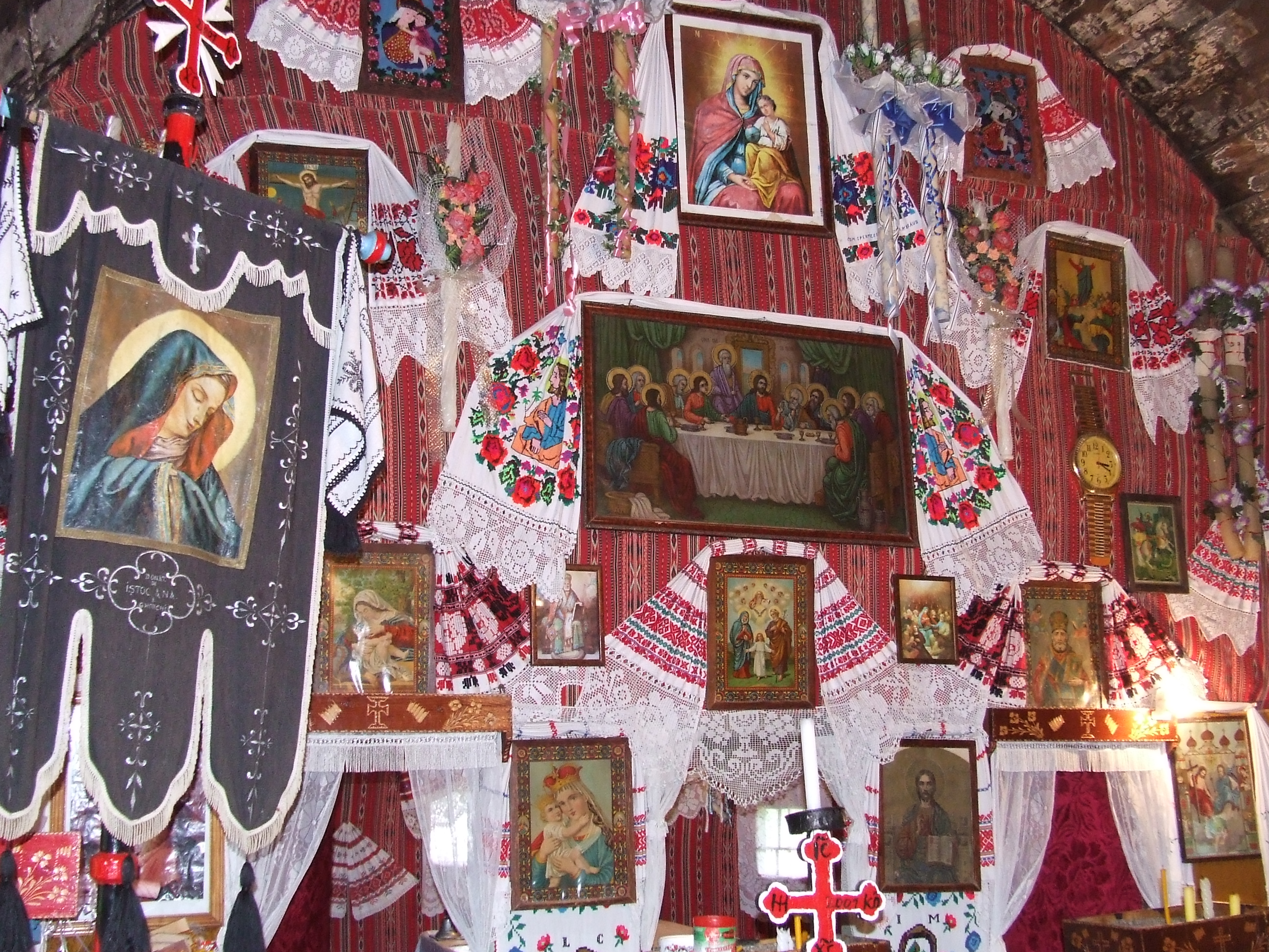 Biserica de lemn din Mierag, judeţul Bihor.